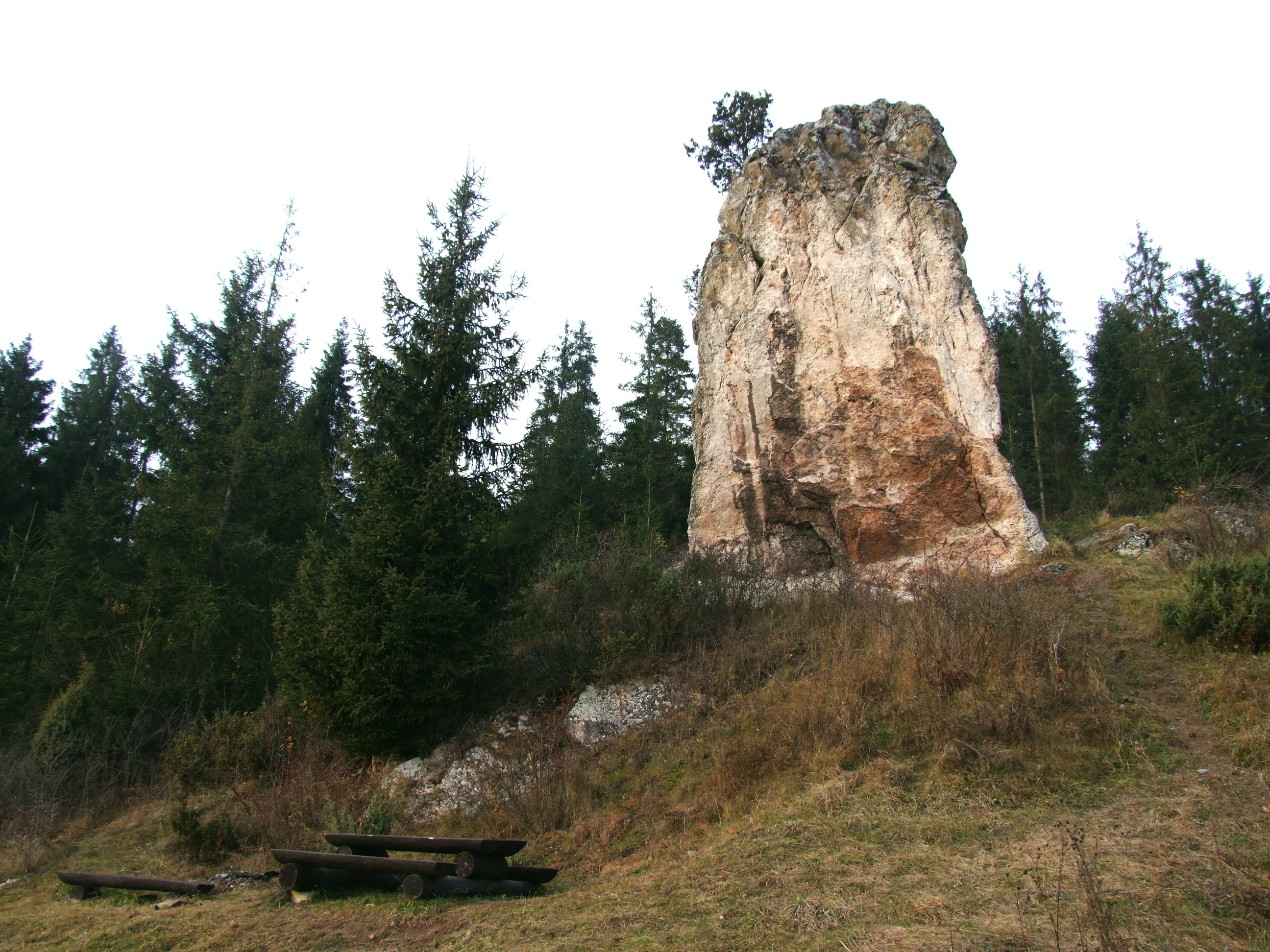 Gęśla w grupie Dursztyńskich Skałek